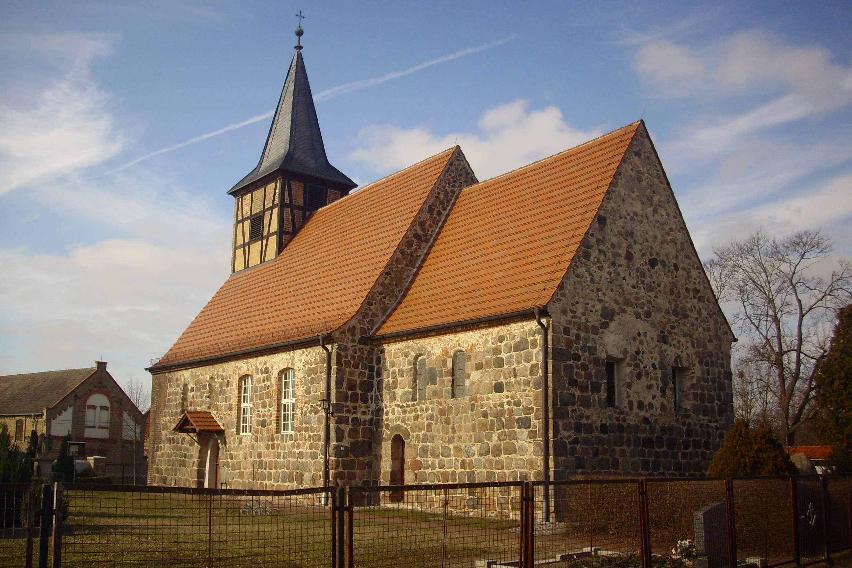 Trebbin, Ortsteil Thyrow in Brandenburg. Die Kirche stammt aus der ersten Hälfte des 13. Jahrhunderts und steht unter Denkmalschutz.